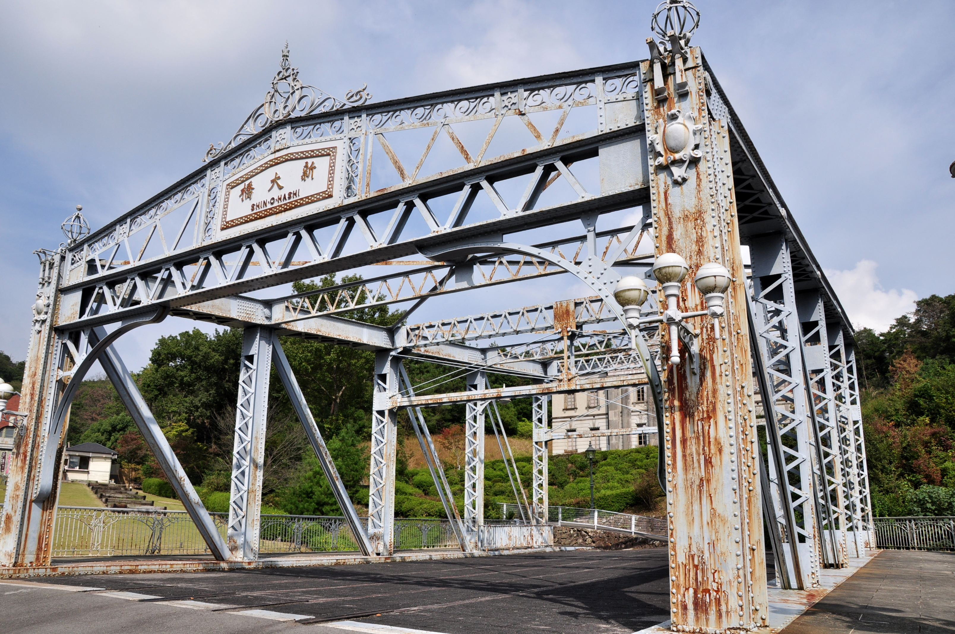 Shin-Ohashi Bridge Chuoh-ku Tokyo, built in 1912, in Museum Meiji Mura